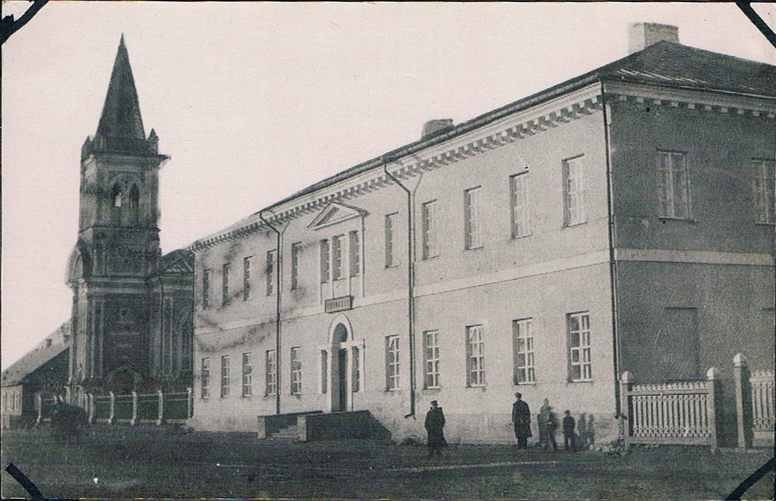 Беларуская (тарашкевіца): Слуцак (Słucak), вуліца Сэнатарская (vulica Senatarskaja). Гімназія і збор.